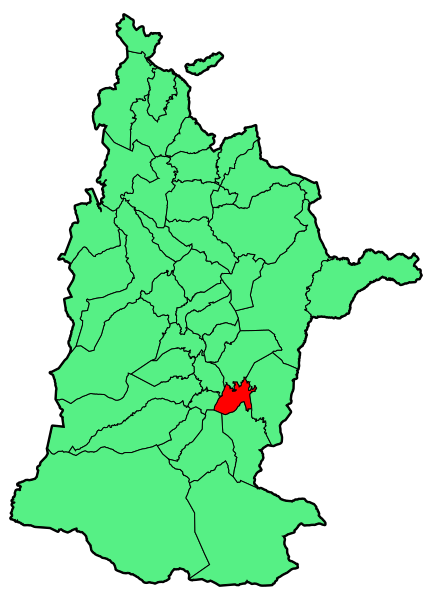 Aipaturiko udalerriaren kokapena Zuberoan